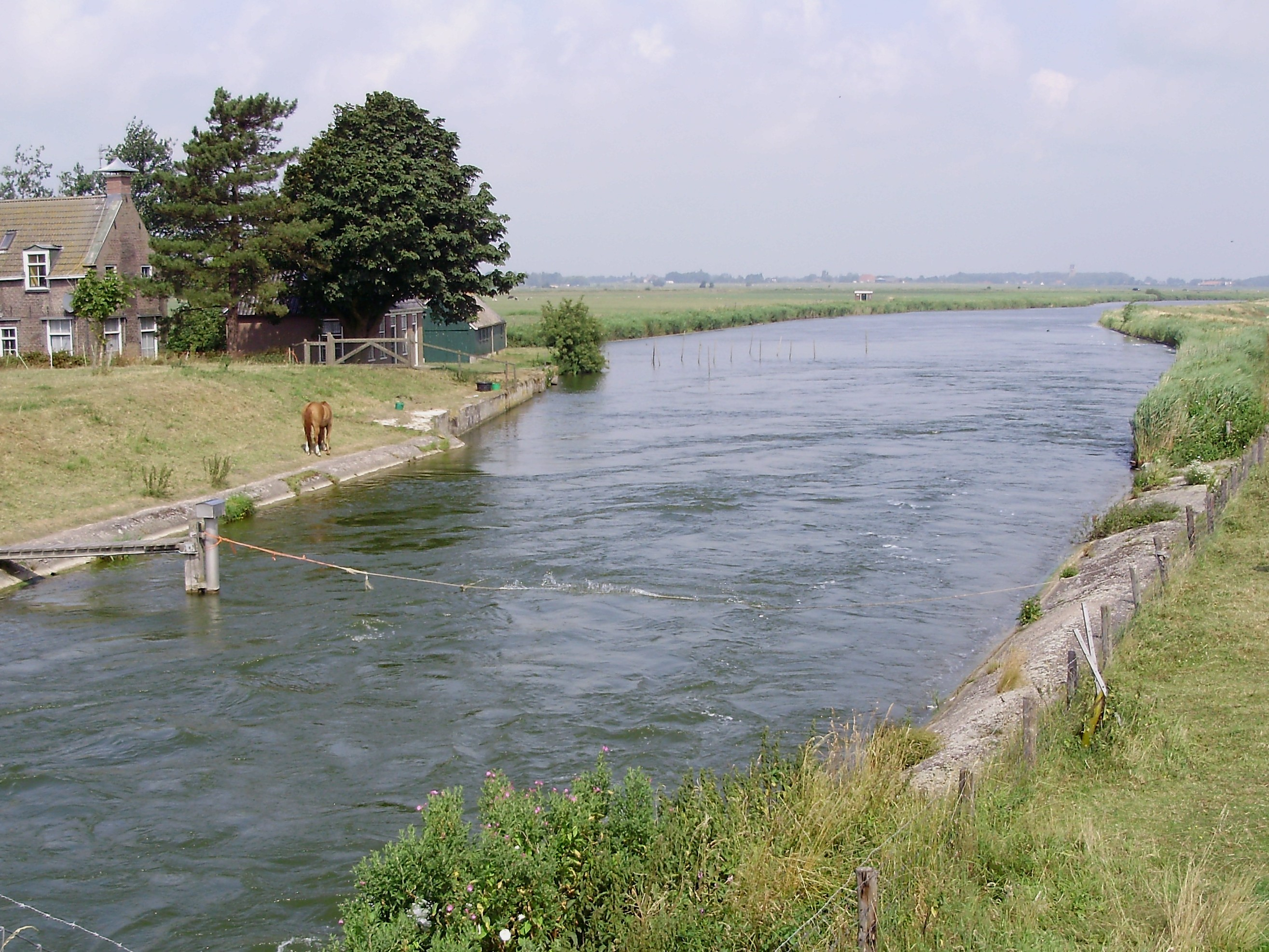 De Ee bij Tacozijl in provincie Friesland, Nederland